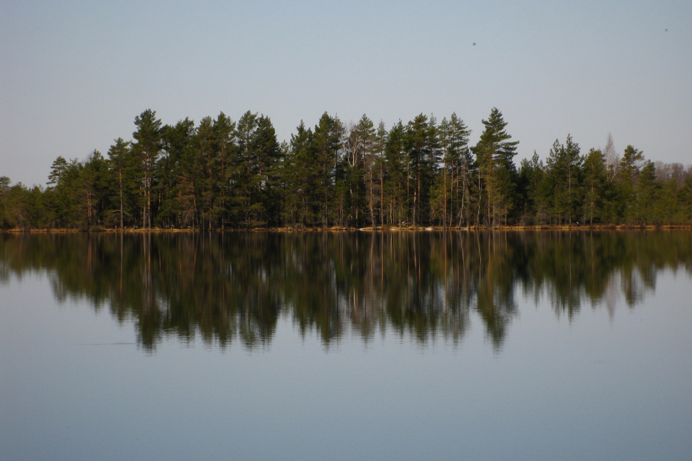 Nigula järveidakaldal, Nigula LKA